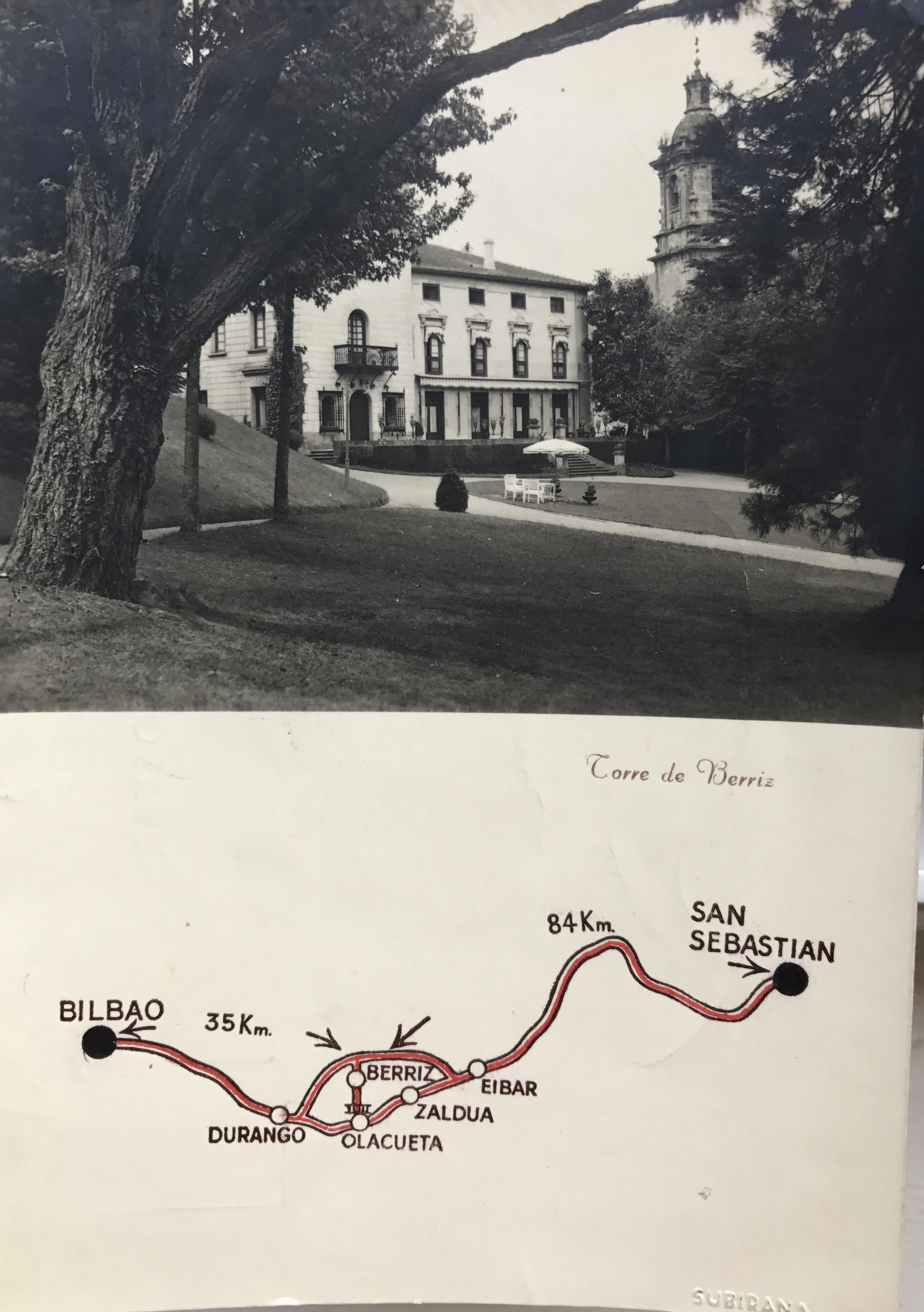 Torre de los Marqueses de Berriz